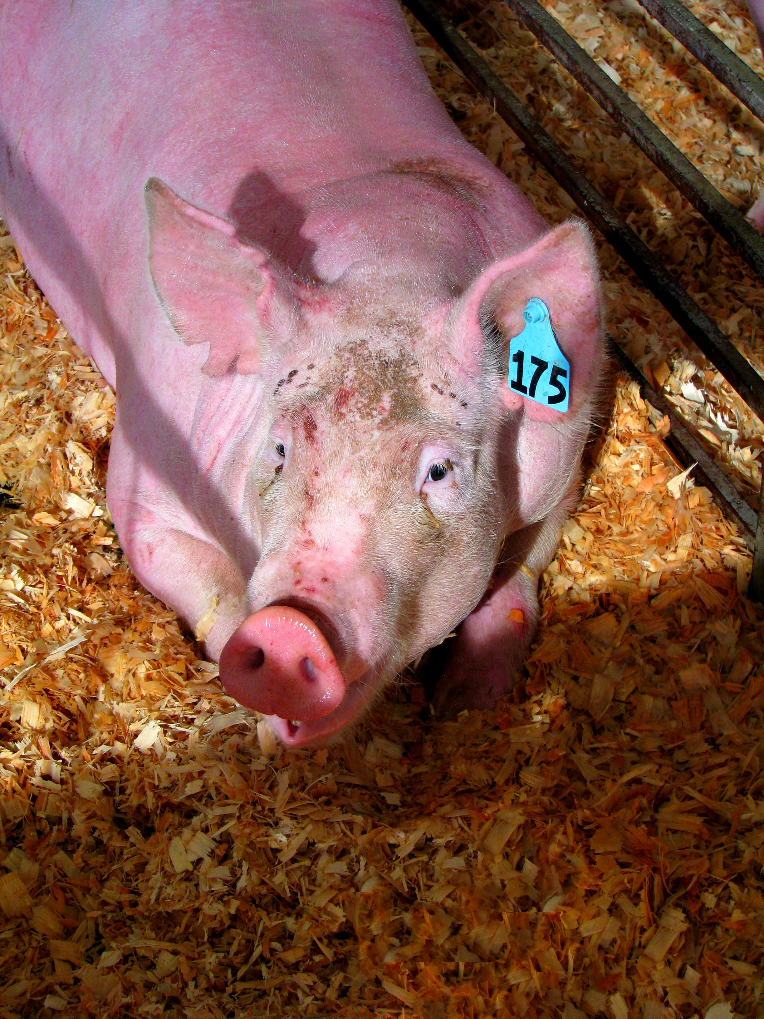 Pink Hog